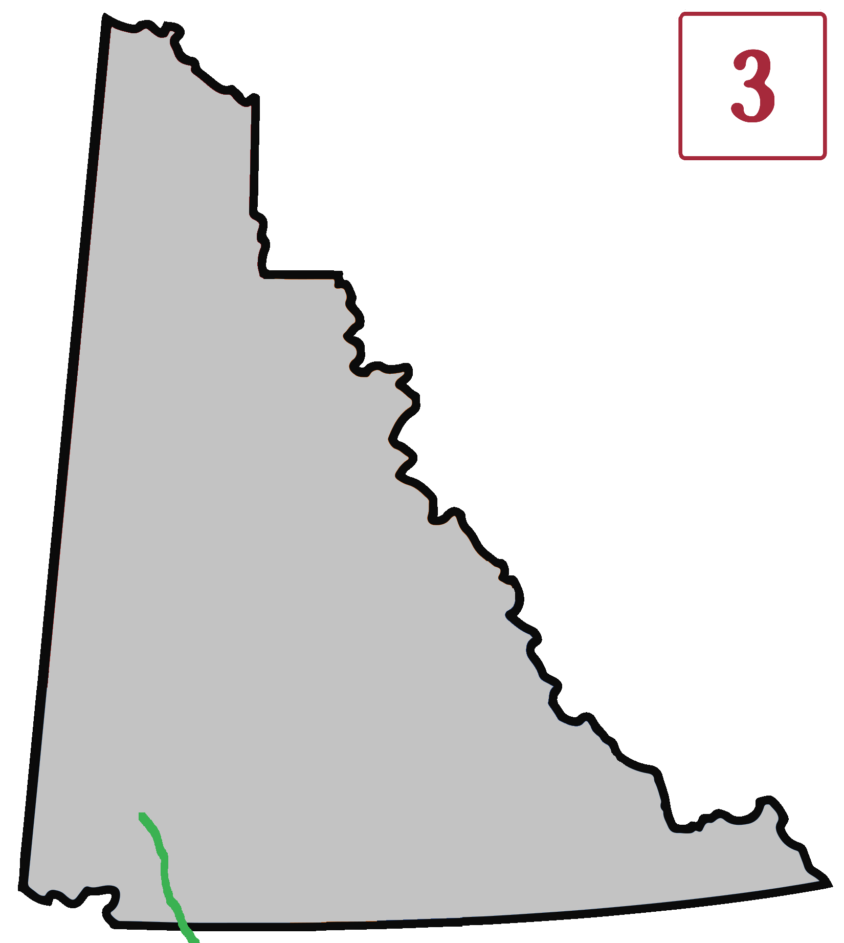 Carte de la route en Yukon